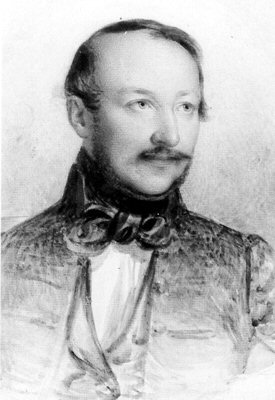 Mihály Vorosmarty